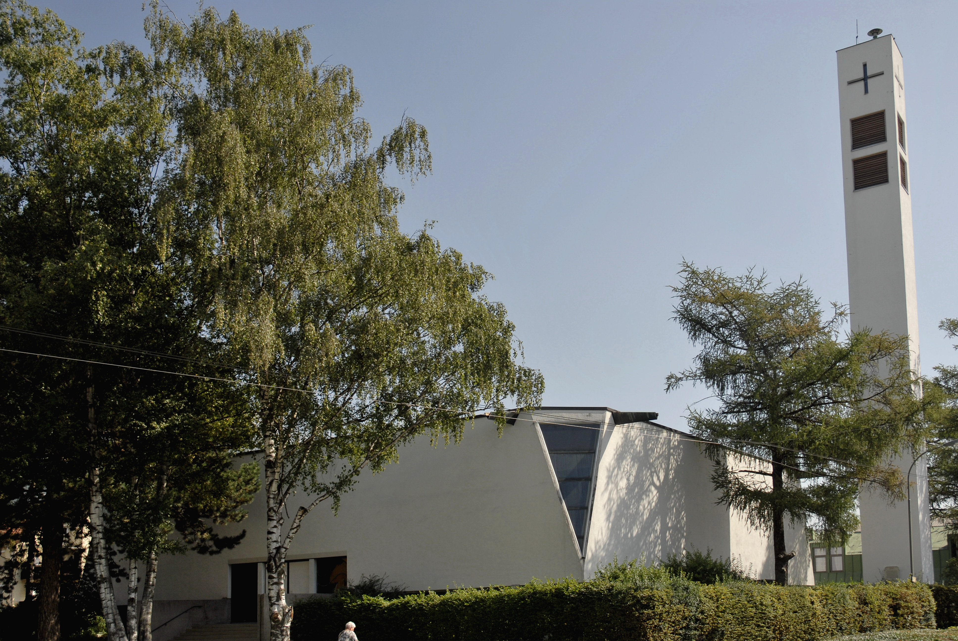 Kirche St. Pius X. in Neu-Arzl, Innsbruck